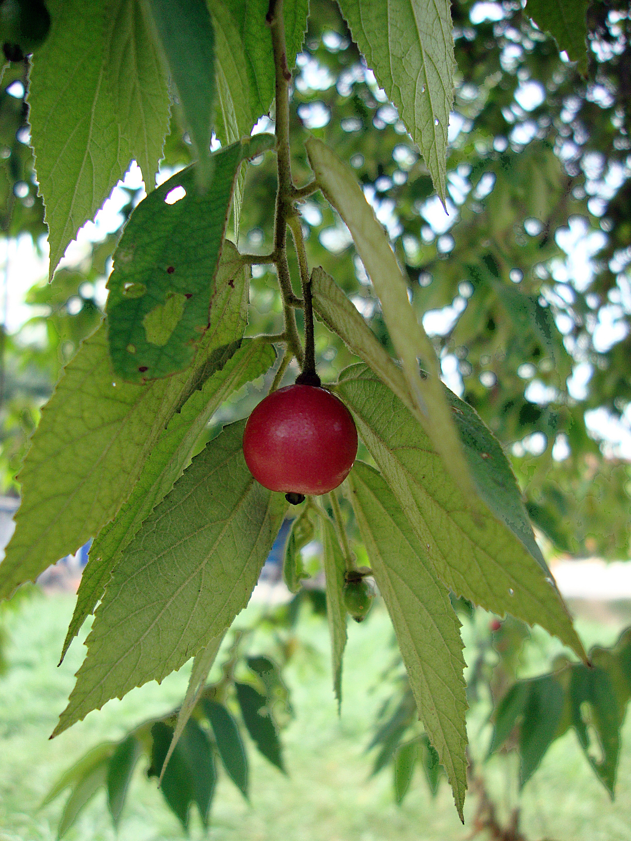 Muntingia calabura L., 1753Tiếng Việt: Quả cây trứng cá